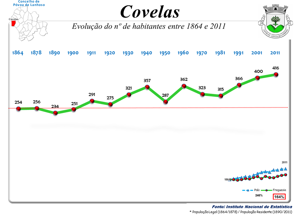 Censos 1864/2011